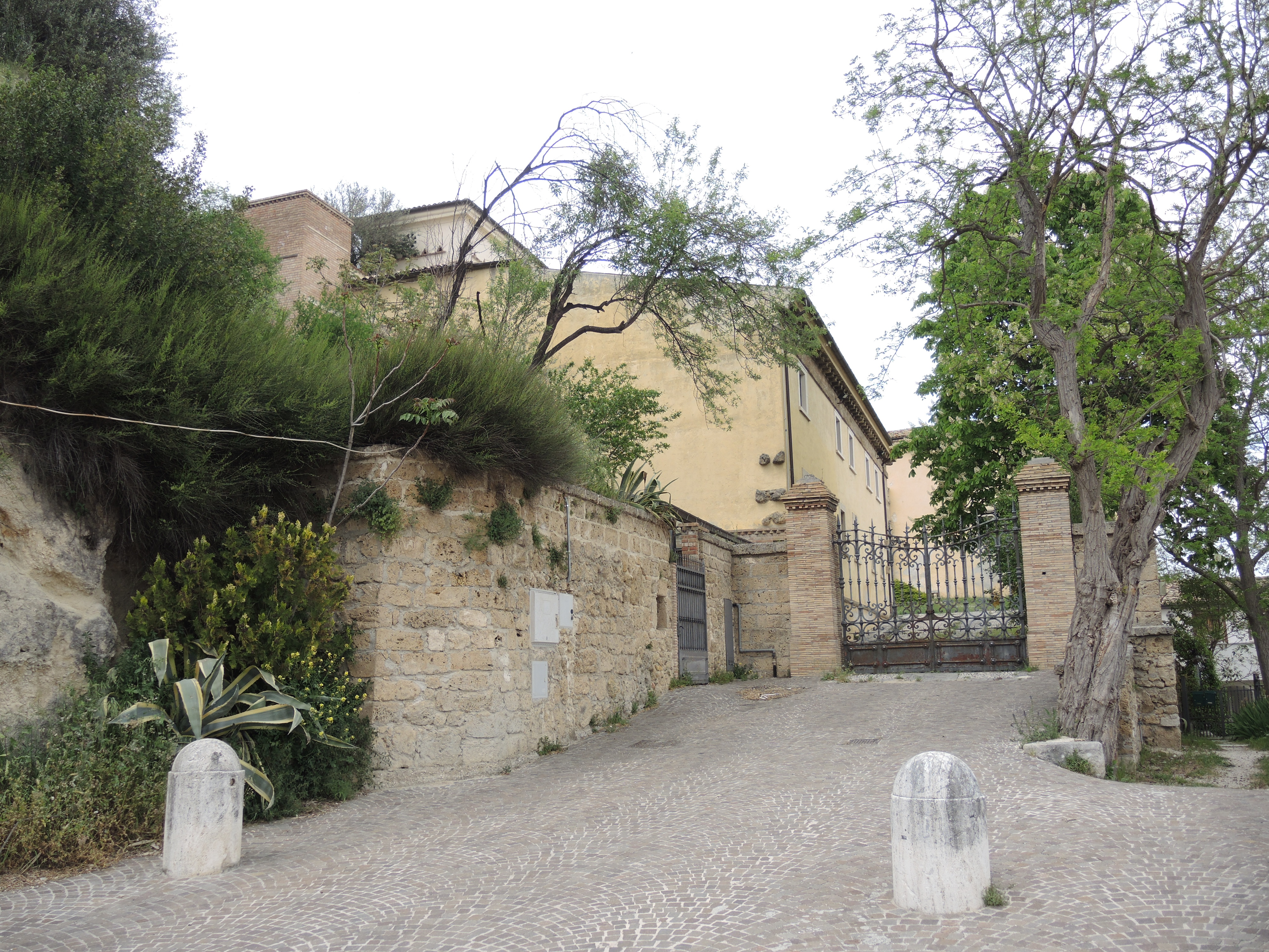 Torre de' Passeri: Castello Gizzi